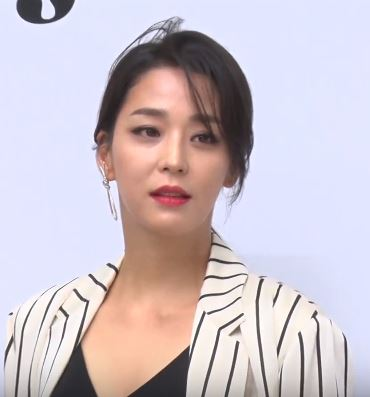 디스패치 구독 클릭!